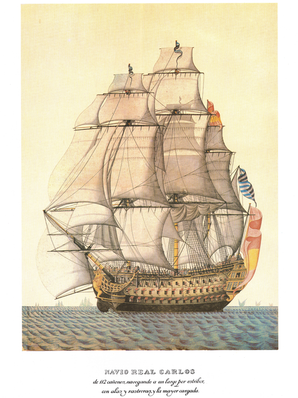 Navío Real Carlos de la Armada Española, realizado por Alejo Berlinguero (1750-1810), museo naval de Madrid